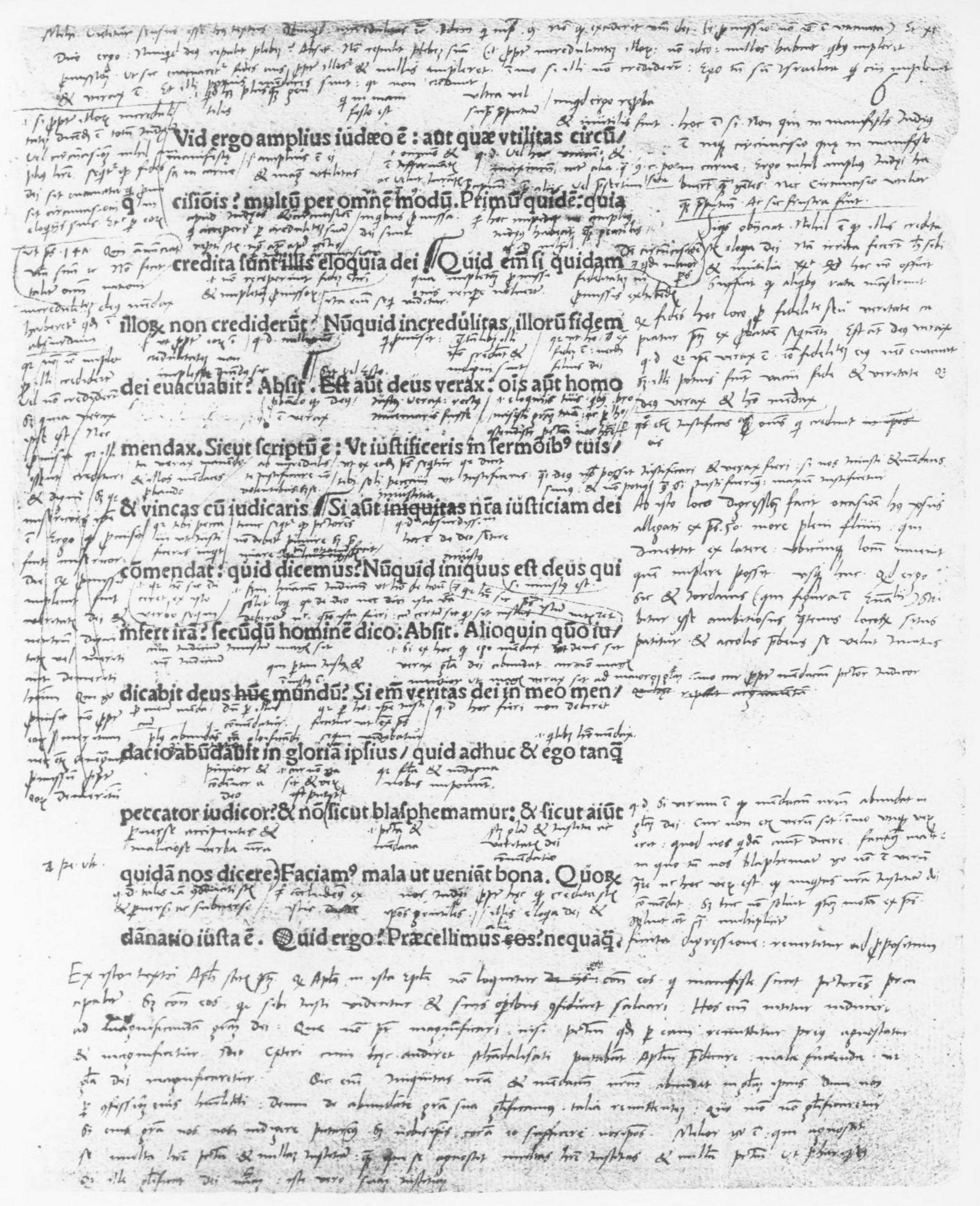 Martin Luther, Seite aus seinem Handexemplar des Römerbriefs (Röm 3, 1-9a) mit eigenhändigen Kommentaren für die Vorlesung (Transkription von Johannes Ficker 1908)